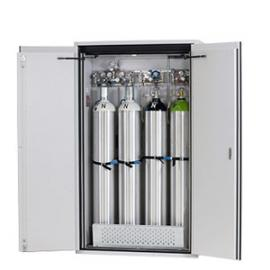 Sicherheitsschrank zur Lagerung von Druckgasflaschen